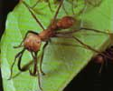 Fourmi Légionnaire